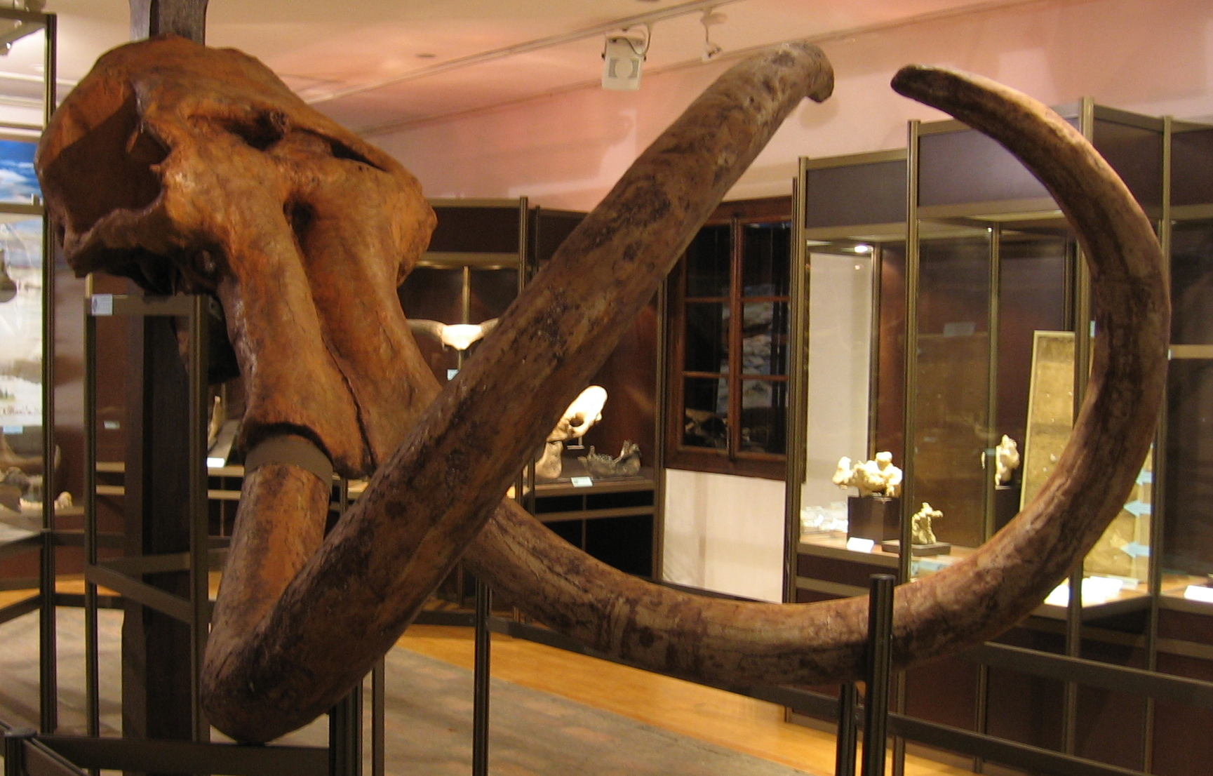 Остаци мамута Mammuthus trogontherii у Природњачки музеј на Калемегдану, у Београду. (пронађени 1996. године у Кикинди)